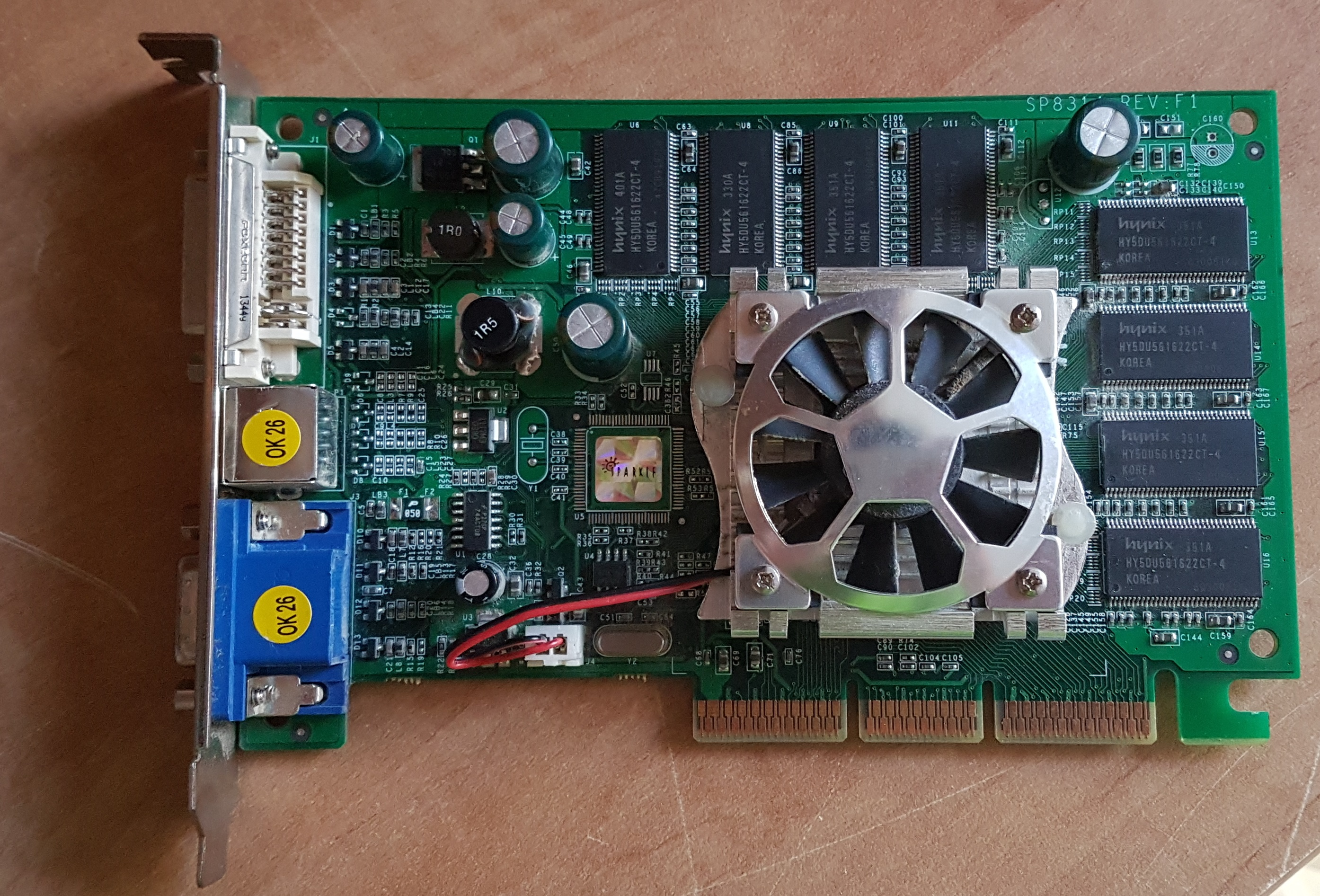 כרטיס מסך מתוצרת NVIDIA מדגם Geforce FX5600 XT בעל ממשק AGP.